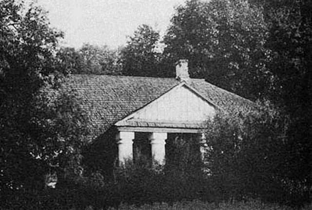 Беларуская (тарашкевіца): Уселюб (Usielub), сядзіба О'Руркаў (O'Rourk)